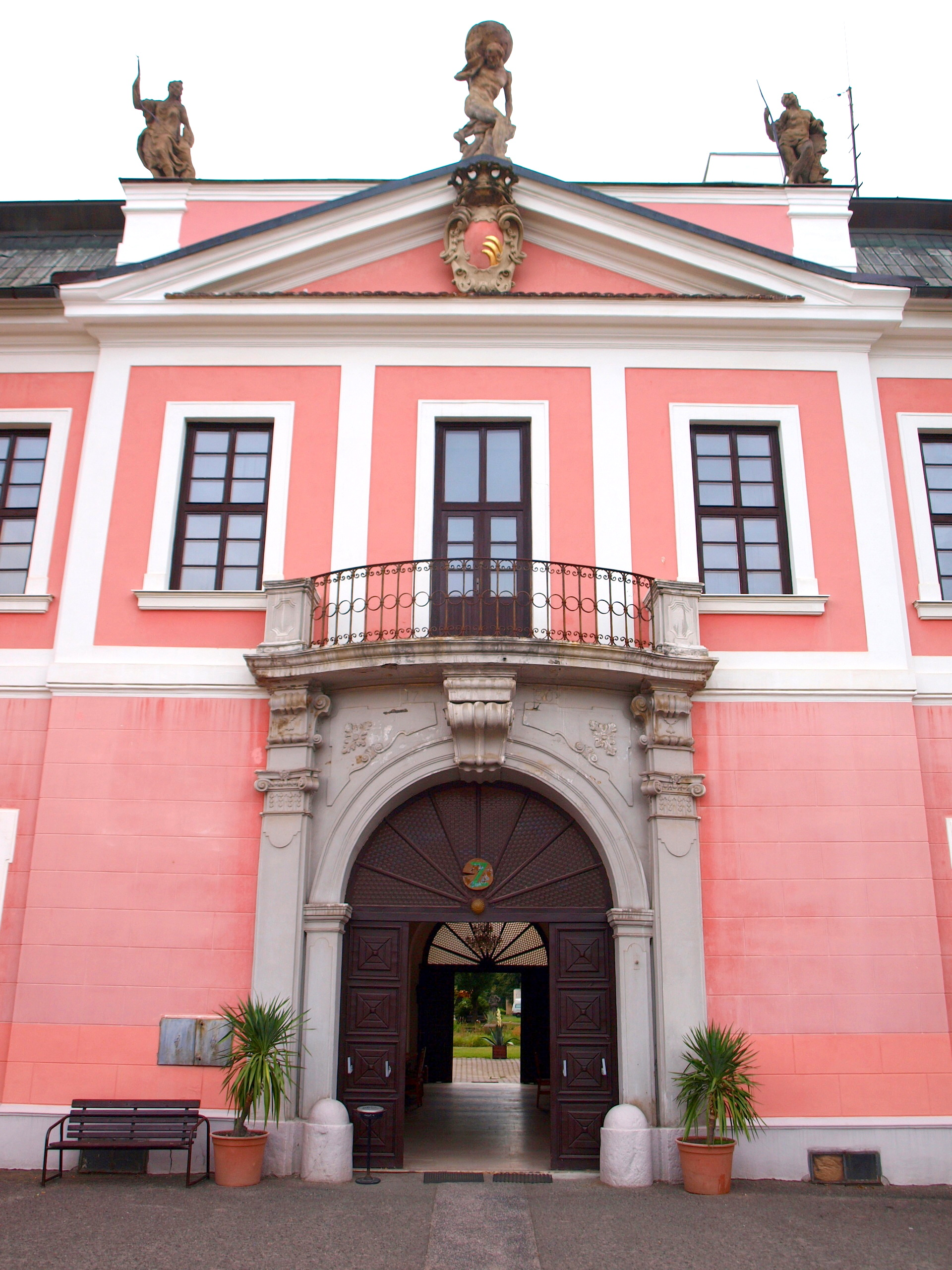 zámek ve Sloupu v Čechách